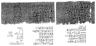 Moskou-papyrus (probleem 14)